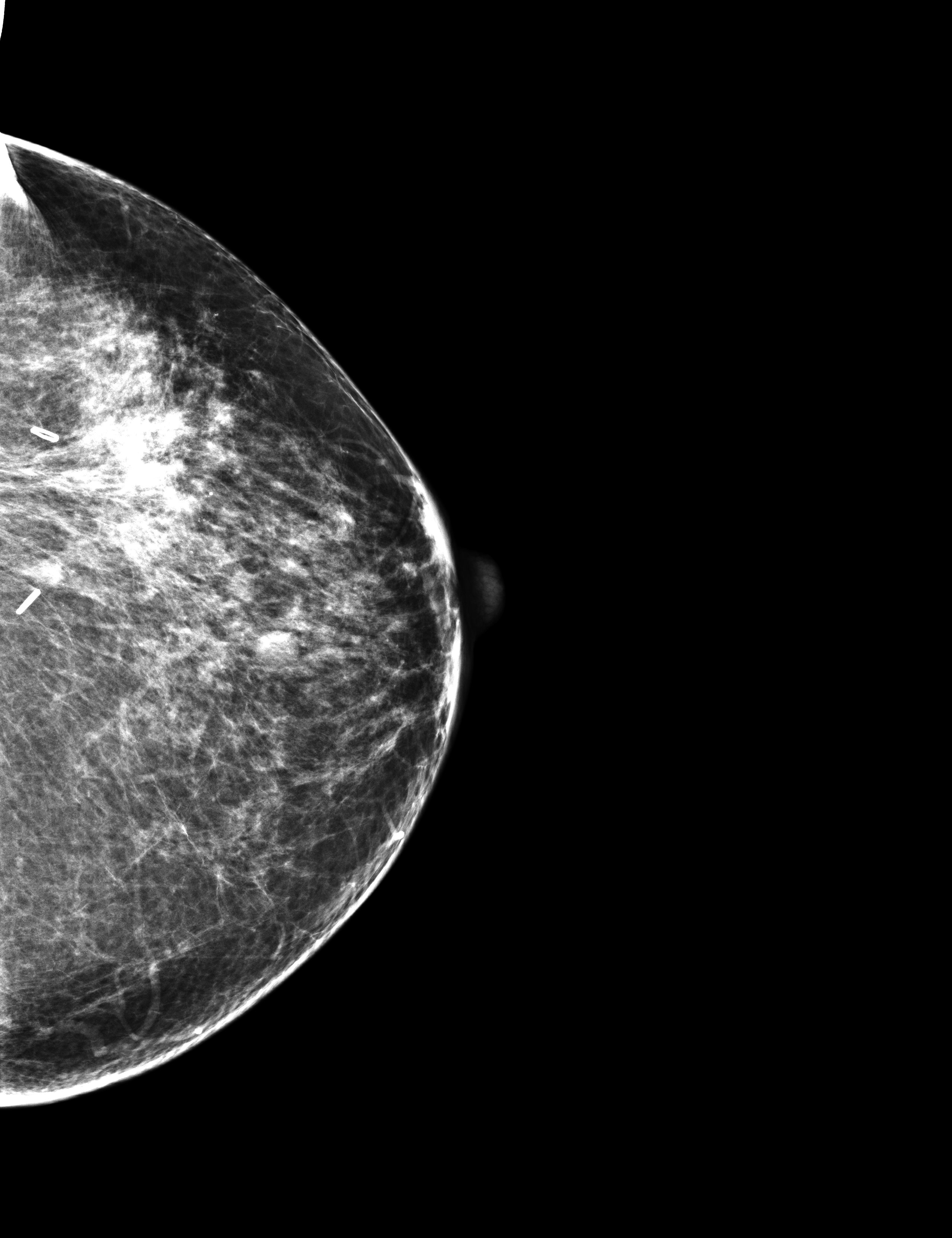 Mamo contrastejpg